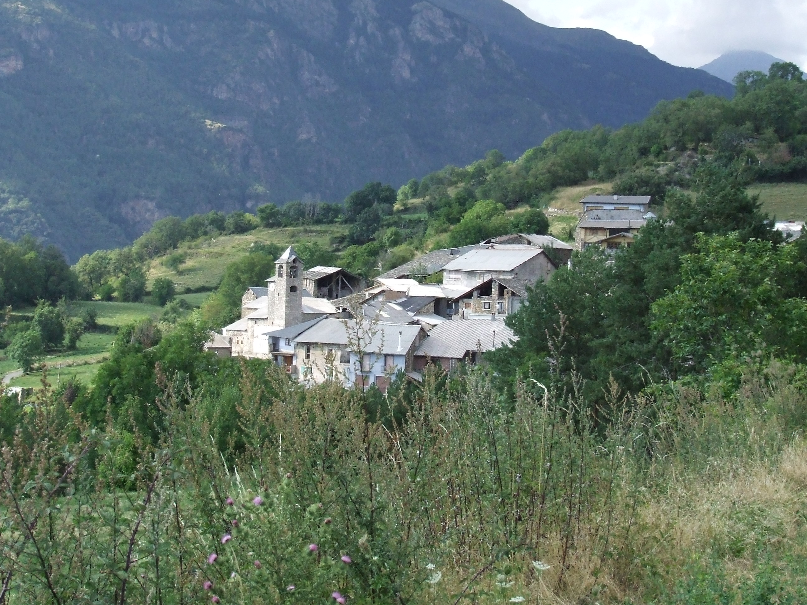 Vista de Mont-ros des de prop de Pobellà (Mont-ros, la Torre de Cabdella, Pallars Jussà)